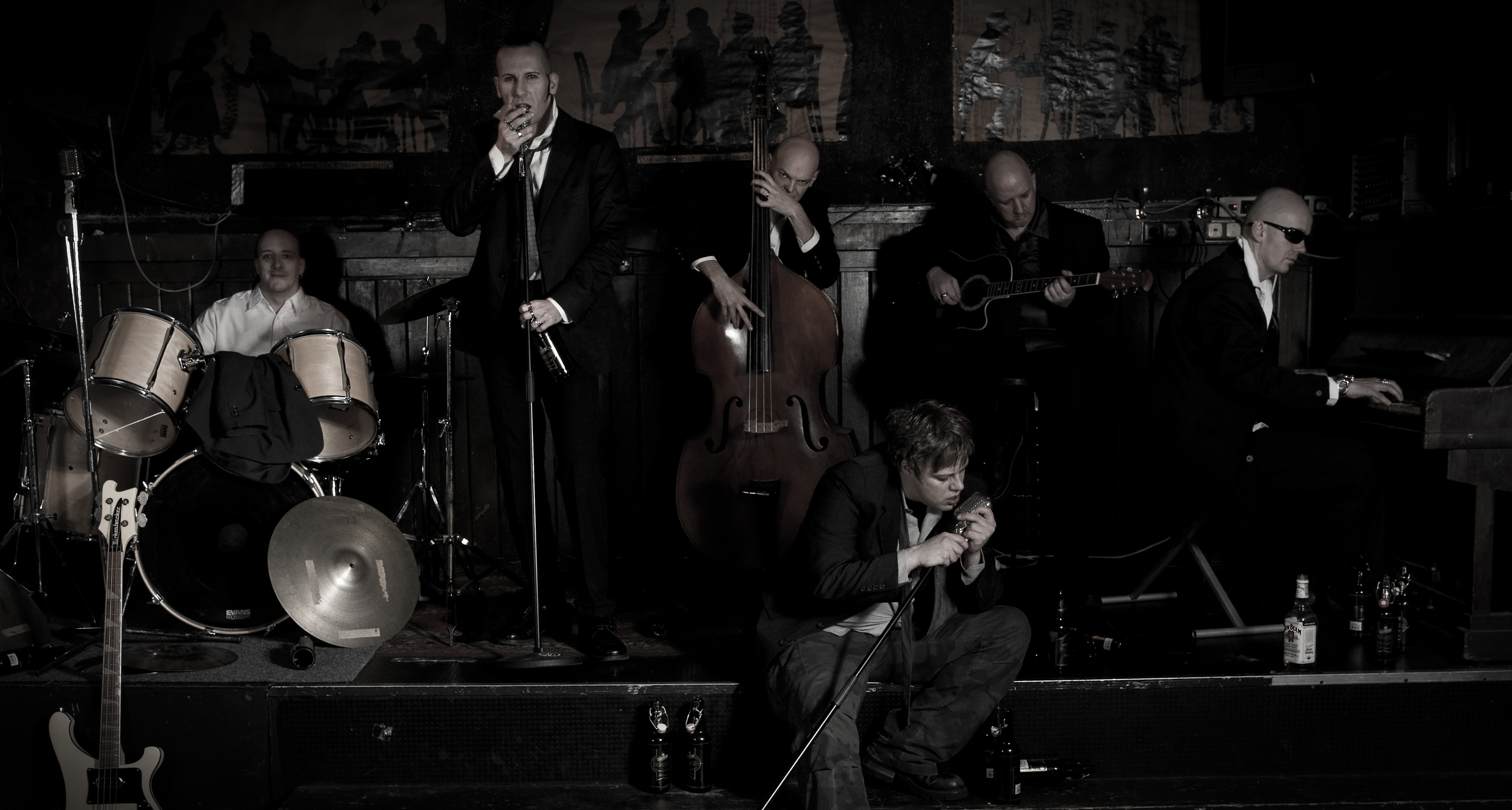 Bild aus einem Fotoshooting aus 2009 in der "Goldenen Krone" in Darmstadt. vlnr. Thomen, Toni, Peter, Jens, Kai, Lothar.